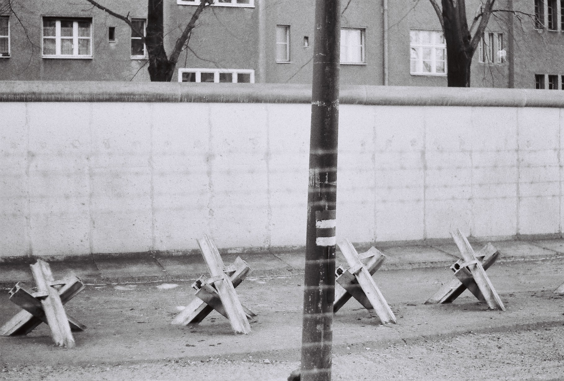 Berliner Mauer, Bouchéstraße in Treptow, Blick von (politisch) Ost nach (politisch) West, ca. 1983 oder 1984, aus einer Offizierswohnung, mit Sperranlagen